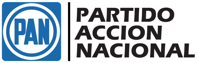 logotipo de partido acción nacional